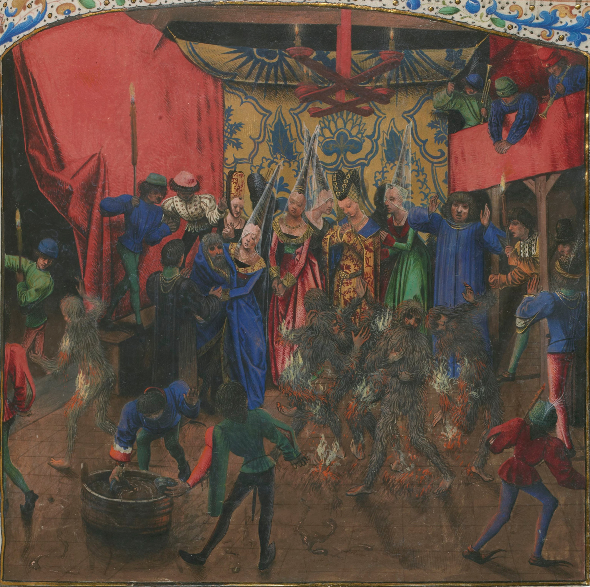 Représentation du Bal des Ardents. Enluminure du XVe siècle réalisée pour les Chroniques de Jean Froissart, BnF, ms. Français 2646, folio 245 verso.